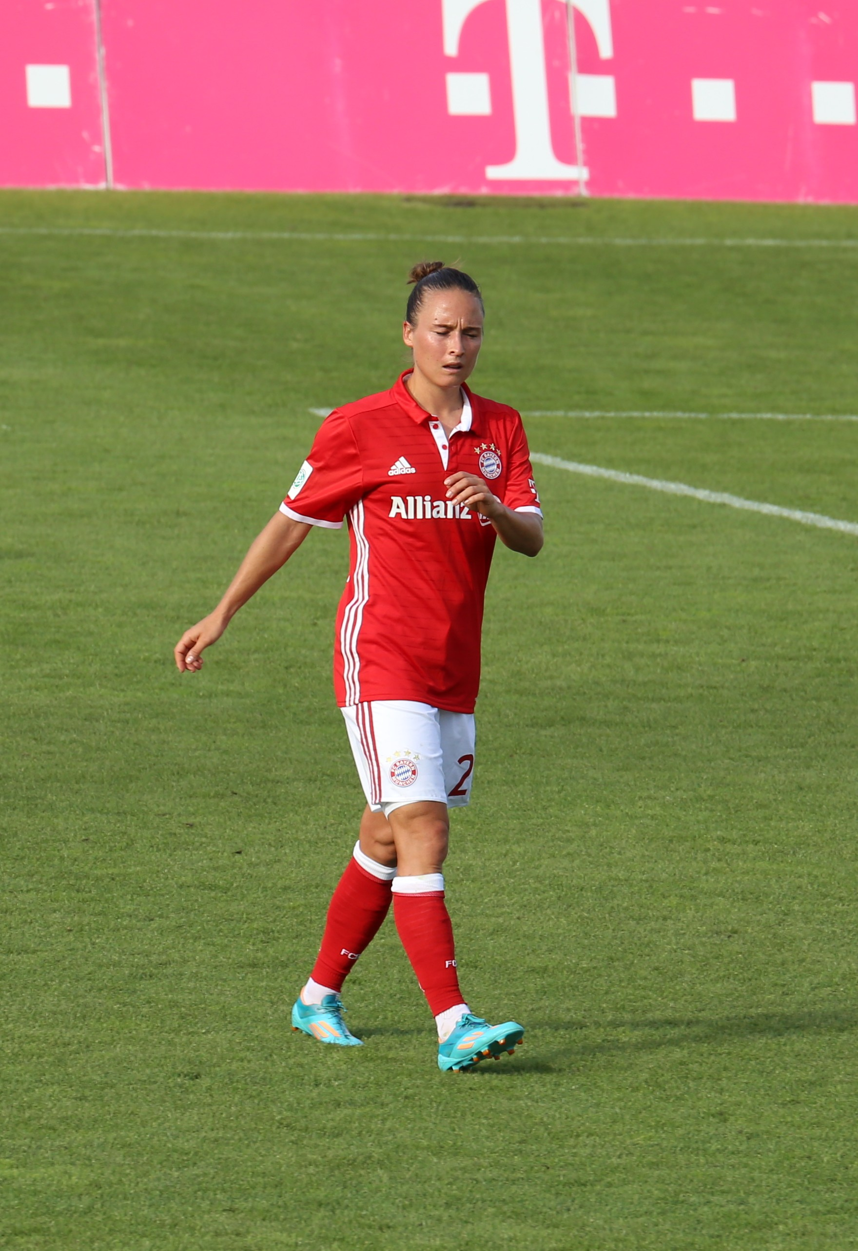 Gina Lewandowski, FC Bayern München, beim Frauen-Bundesliga-Spiel FC Bayern München gegen SC Freiburg am 3. September 2016 im Stadion an der Grünwalder Straße (Ergebnis war 1:1).